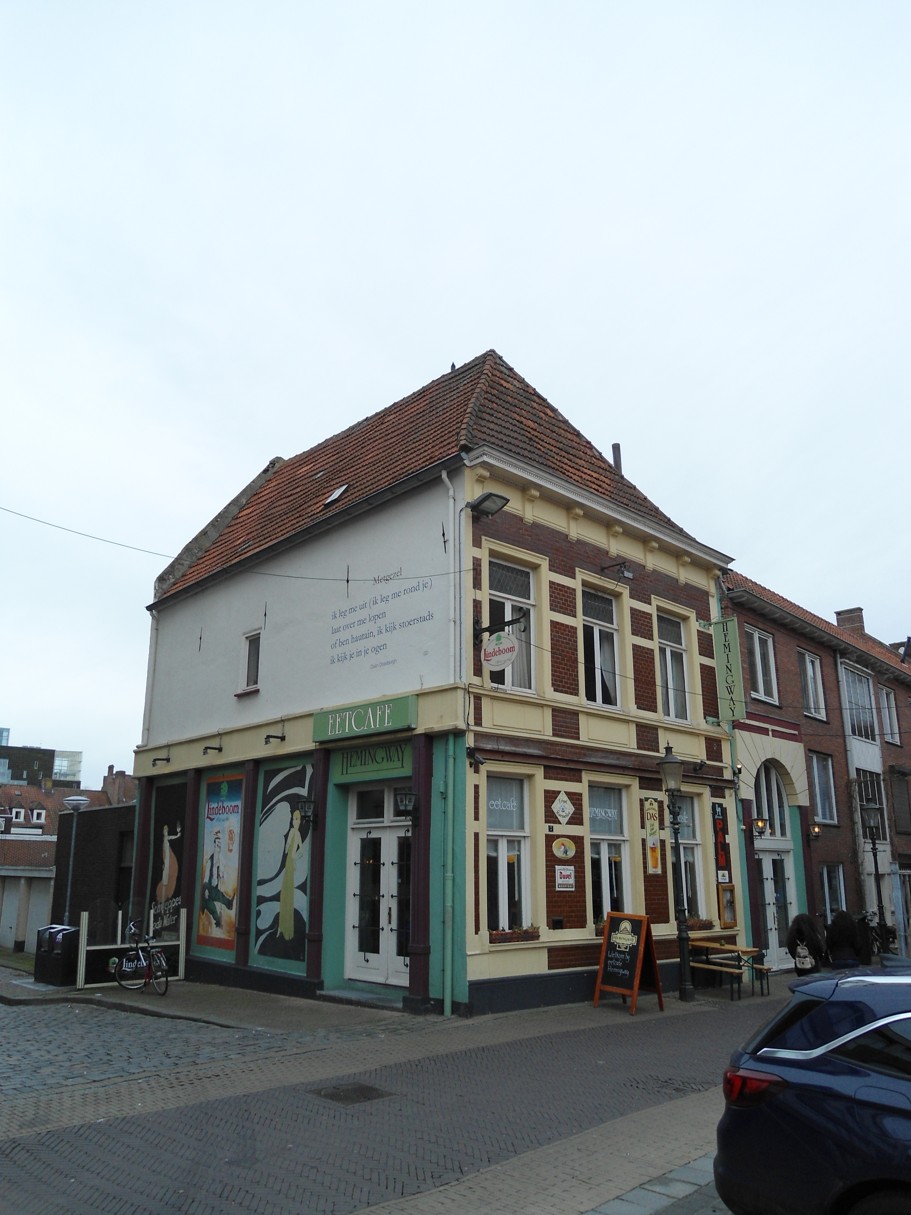 De voor- en zijgevel van het 15e eeuwse pand Hemingway aan de Heilige Geeststraat te Venlo